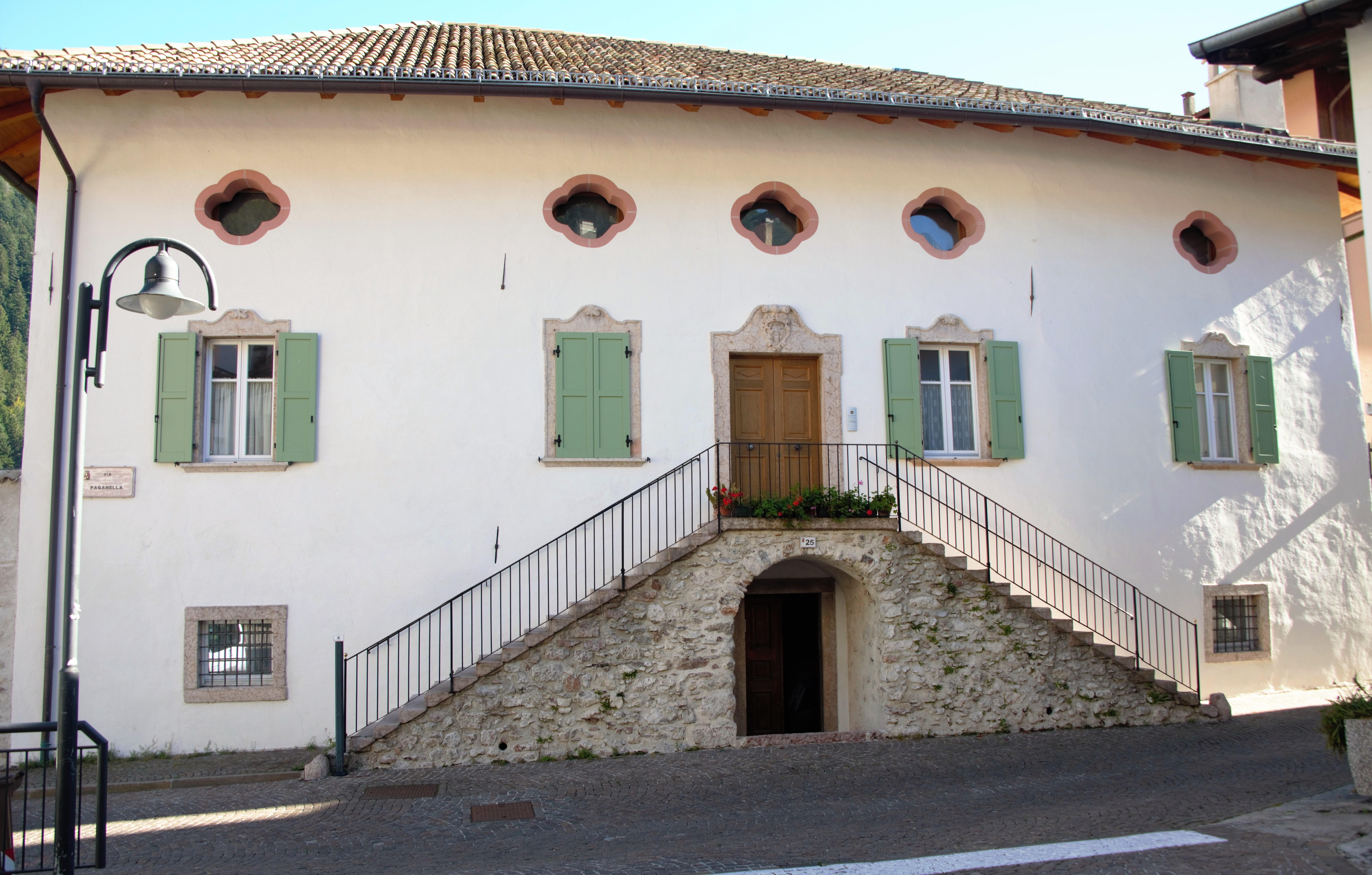 Palazzo Saracini. Veduta lato principale, lato est. This is a photo of a monument which is part of cultural heritage of Italy.